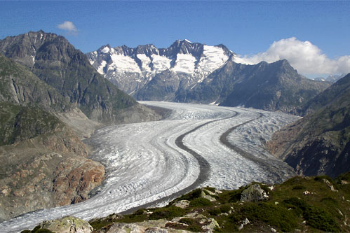 Aletschgletscher mit dem Grossen Wannenhorn